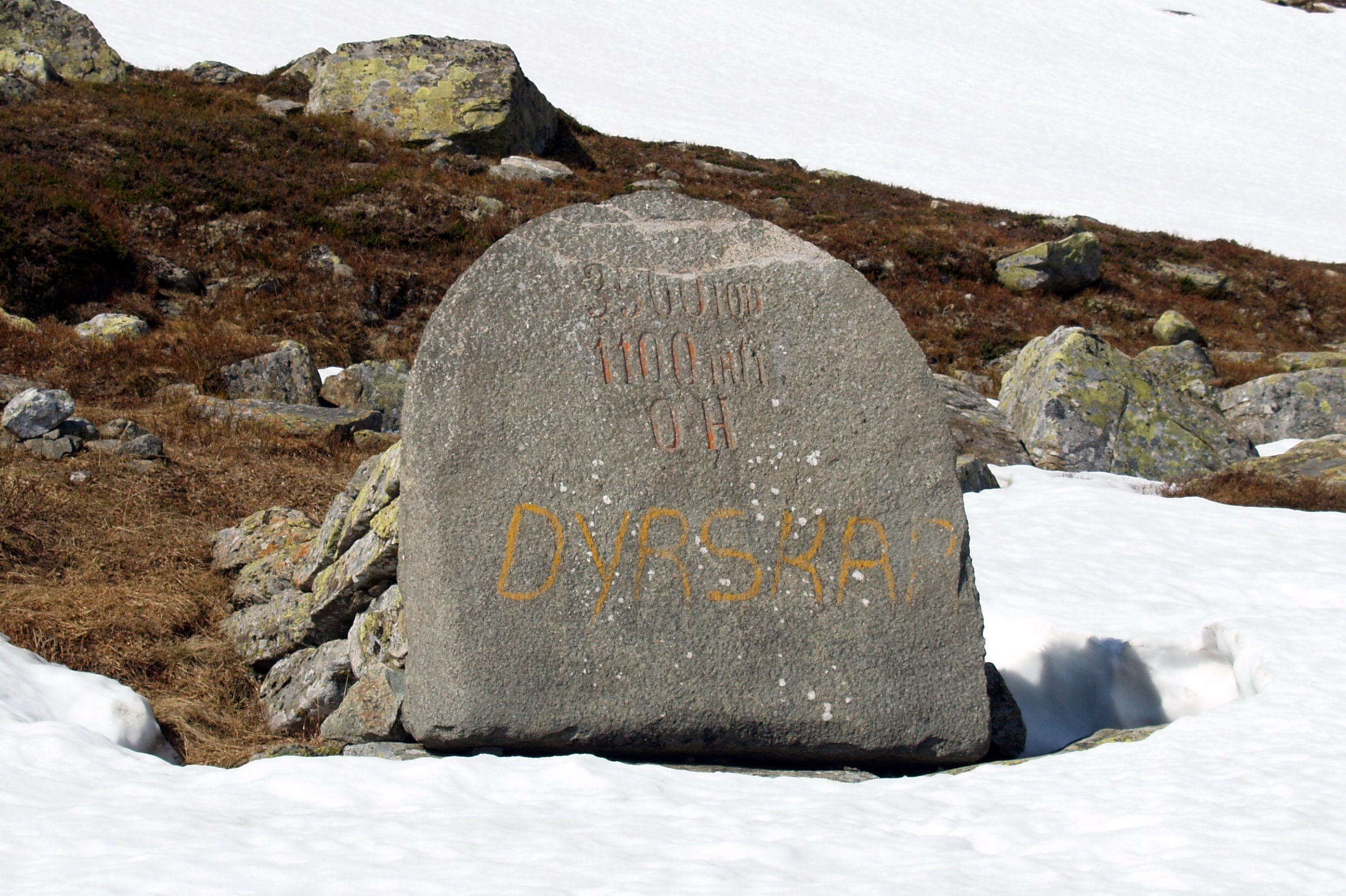 Dyrskar